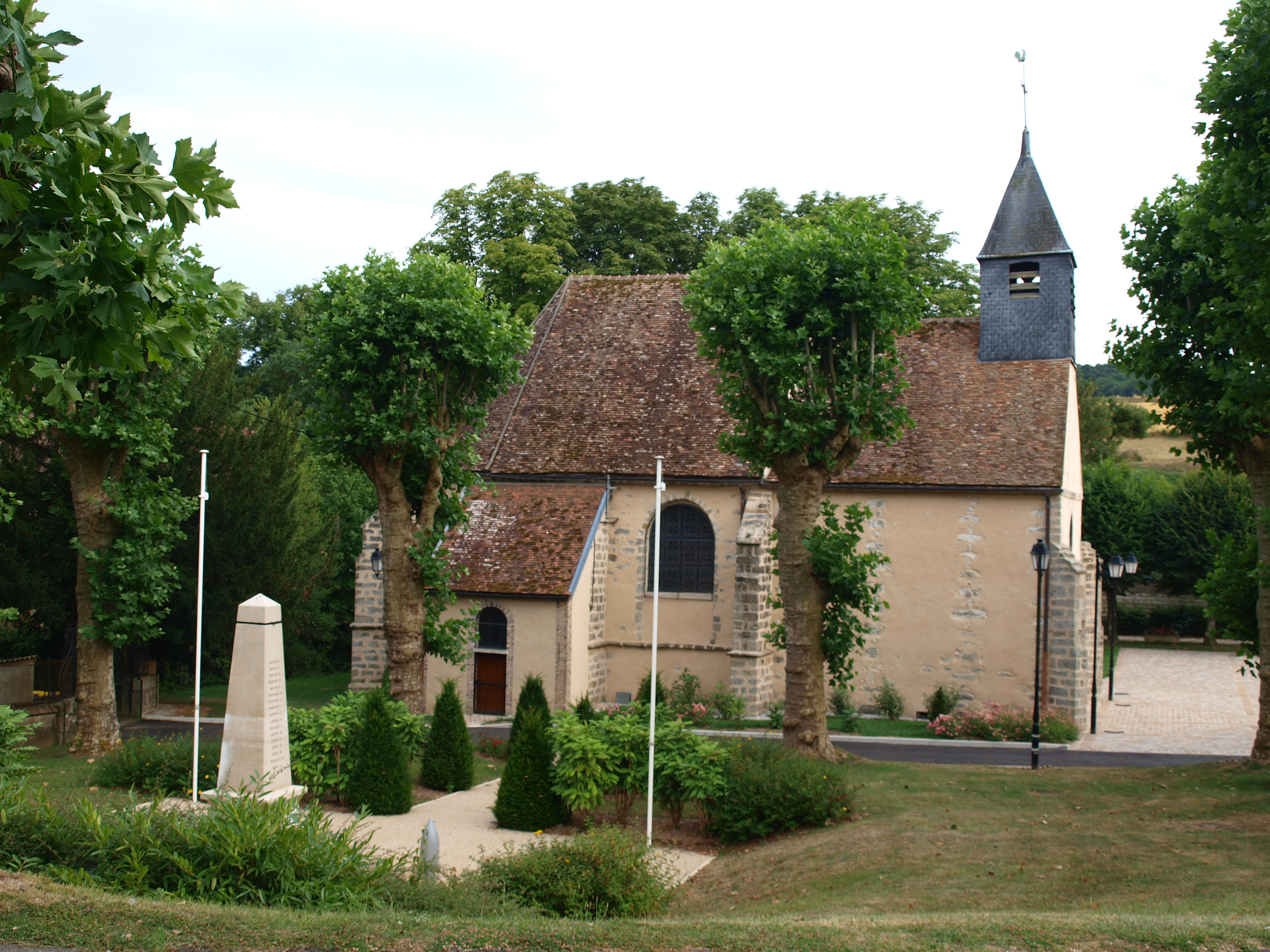 Paron (Yonne, France) ; l'église & le monument aux morts.